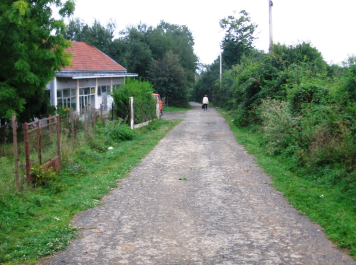 Драјинци